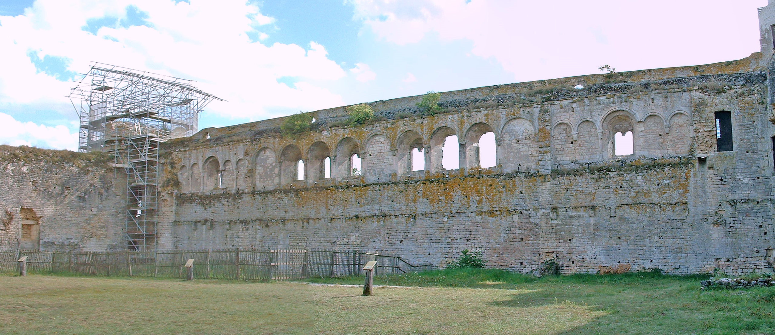 Château-fort de Druyes-les-belles-Fontaines, Yonne) - la galerie romane